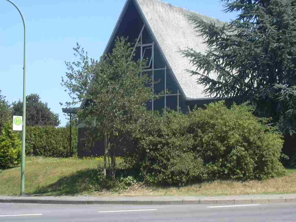 Jüngersdorfbei Langerwehe Own Work papa1234 2006-07-14